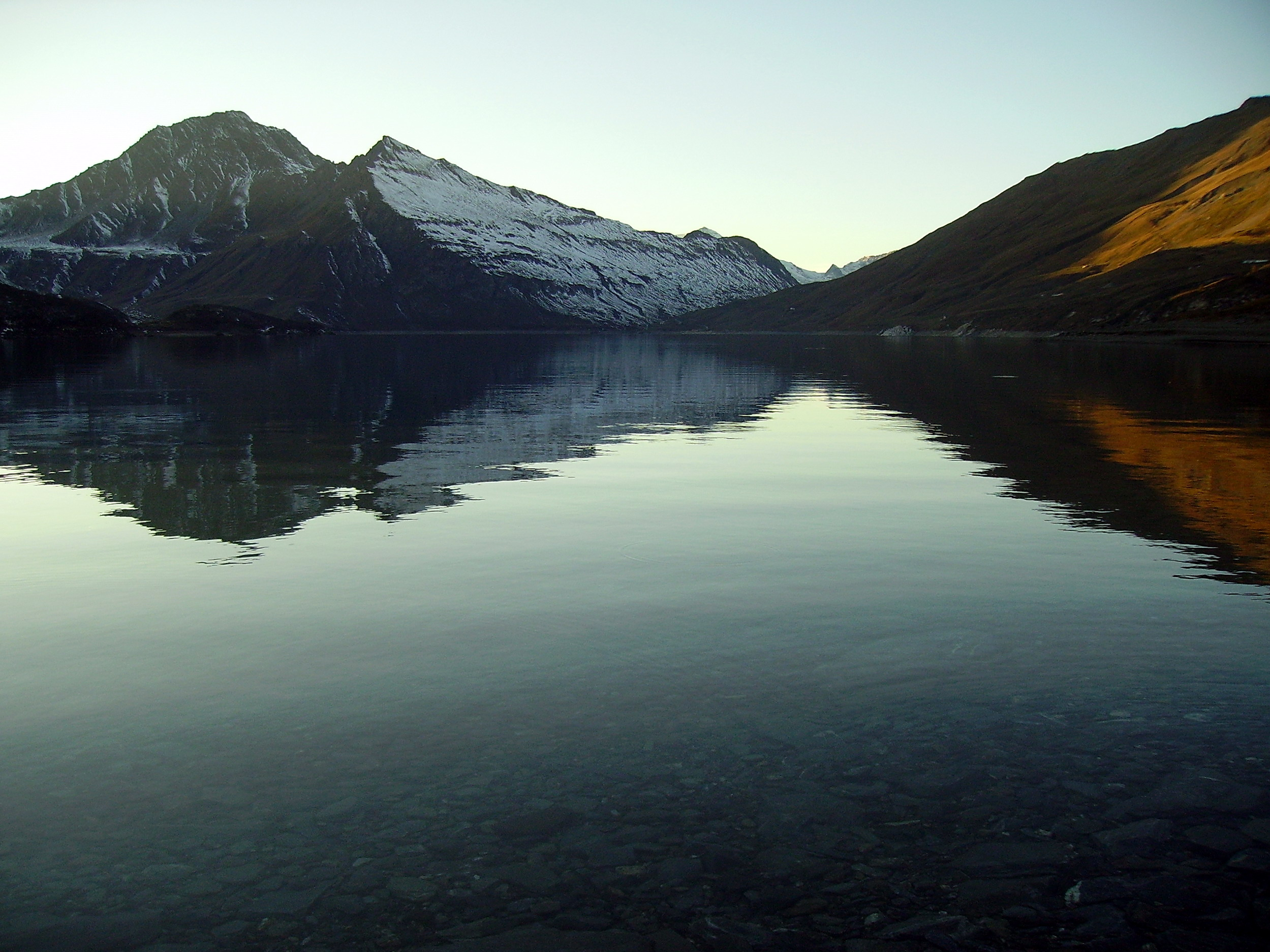 Lago del Moncenisio (Francia)